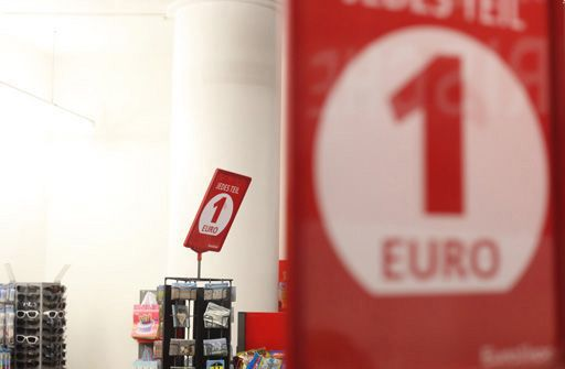 Schaufenster in Deutschland